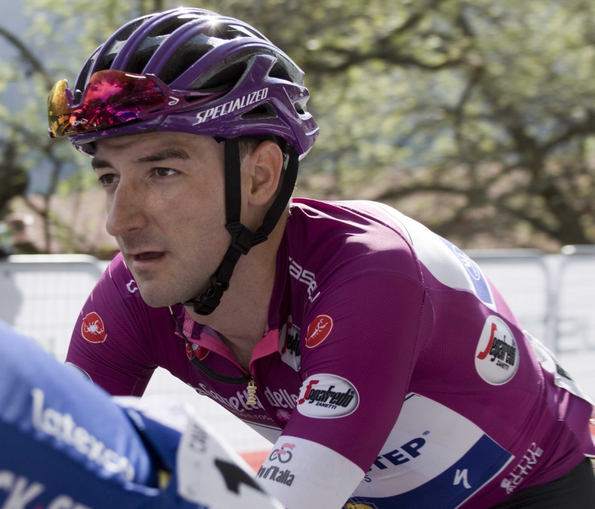 GIR30183 viviani